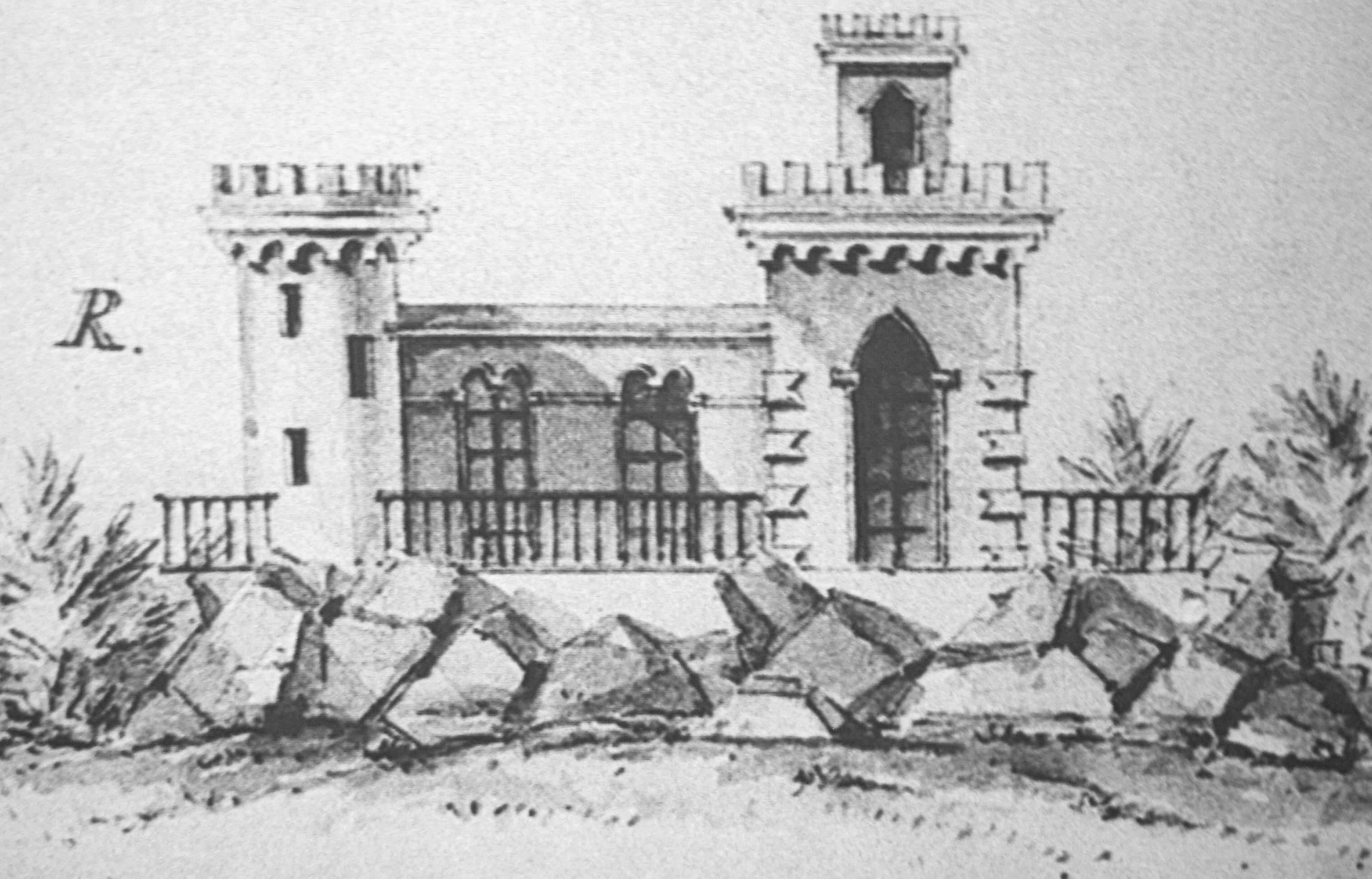 Pumphuset för Hagaparkens vattenuppfordringsverk (planerat)